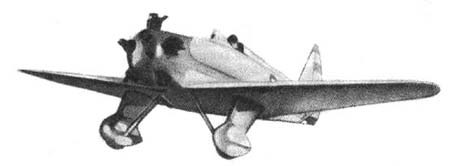 Yakovlev UT-1